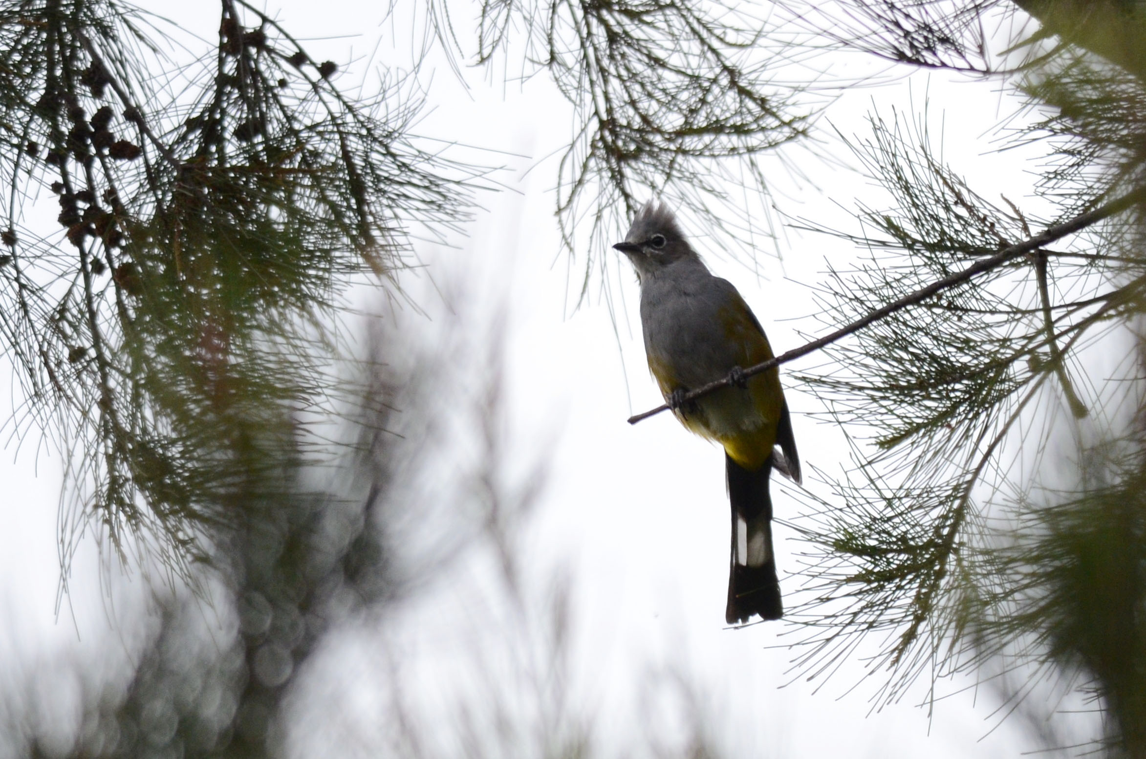 Tepoztlán, Morelos, México. Agosto 2013